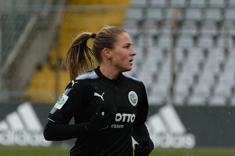 Ana-Maria Crnogorčević 2017 vs FC Bayern München